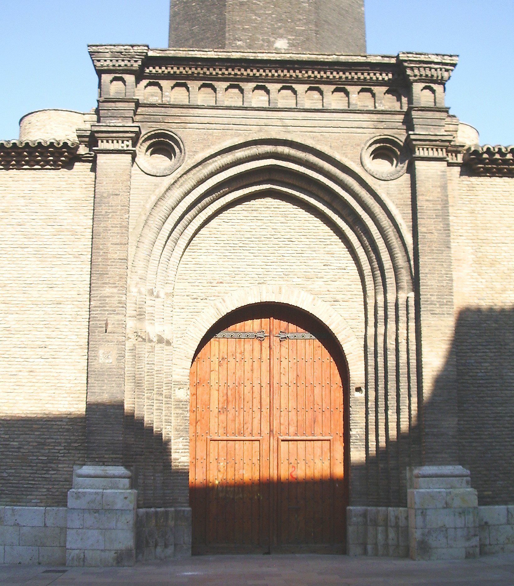 Puerta del Fosal de la Iglesia de San Pablo de Zaragoza